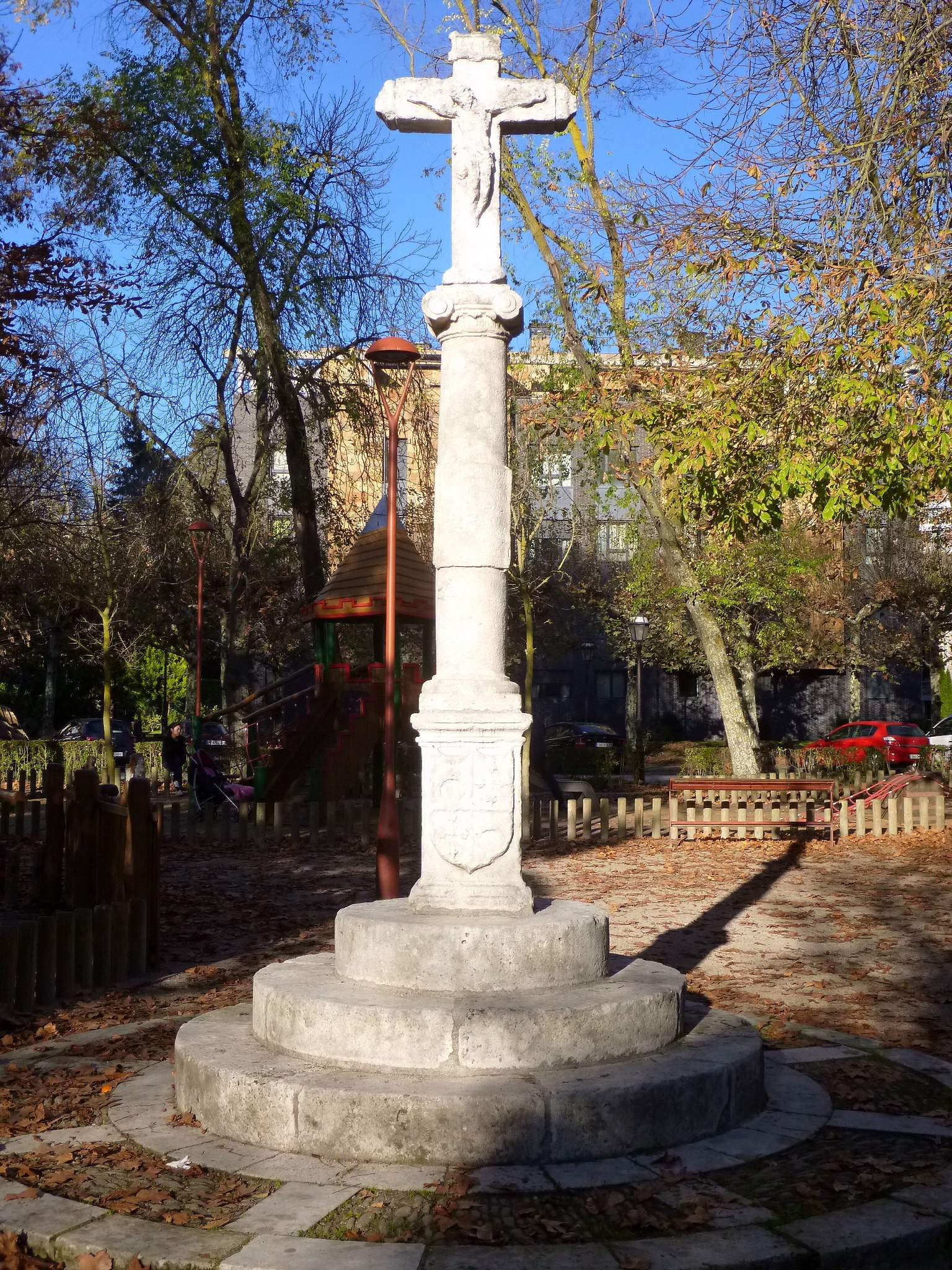 Burgos - Parque de la Isla